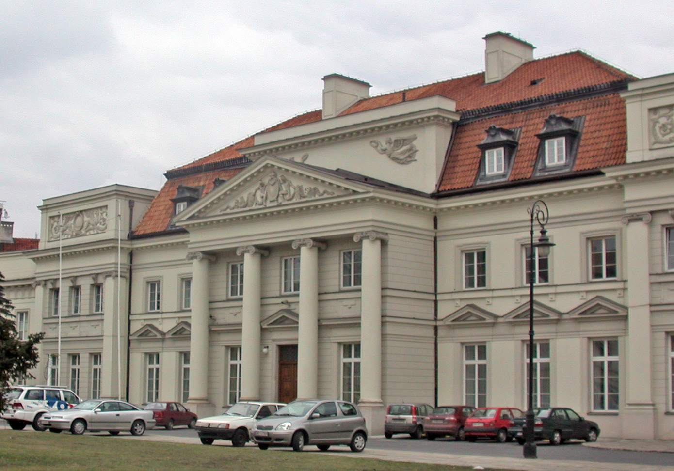 Varsavia, Palazzo del Primate (Pałac Prymaskowski) sulla via Senatorska.